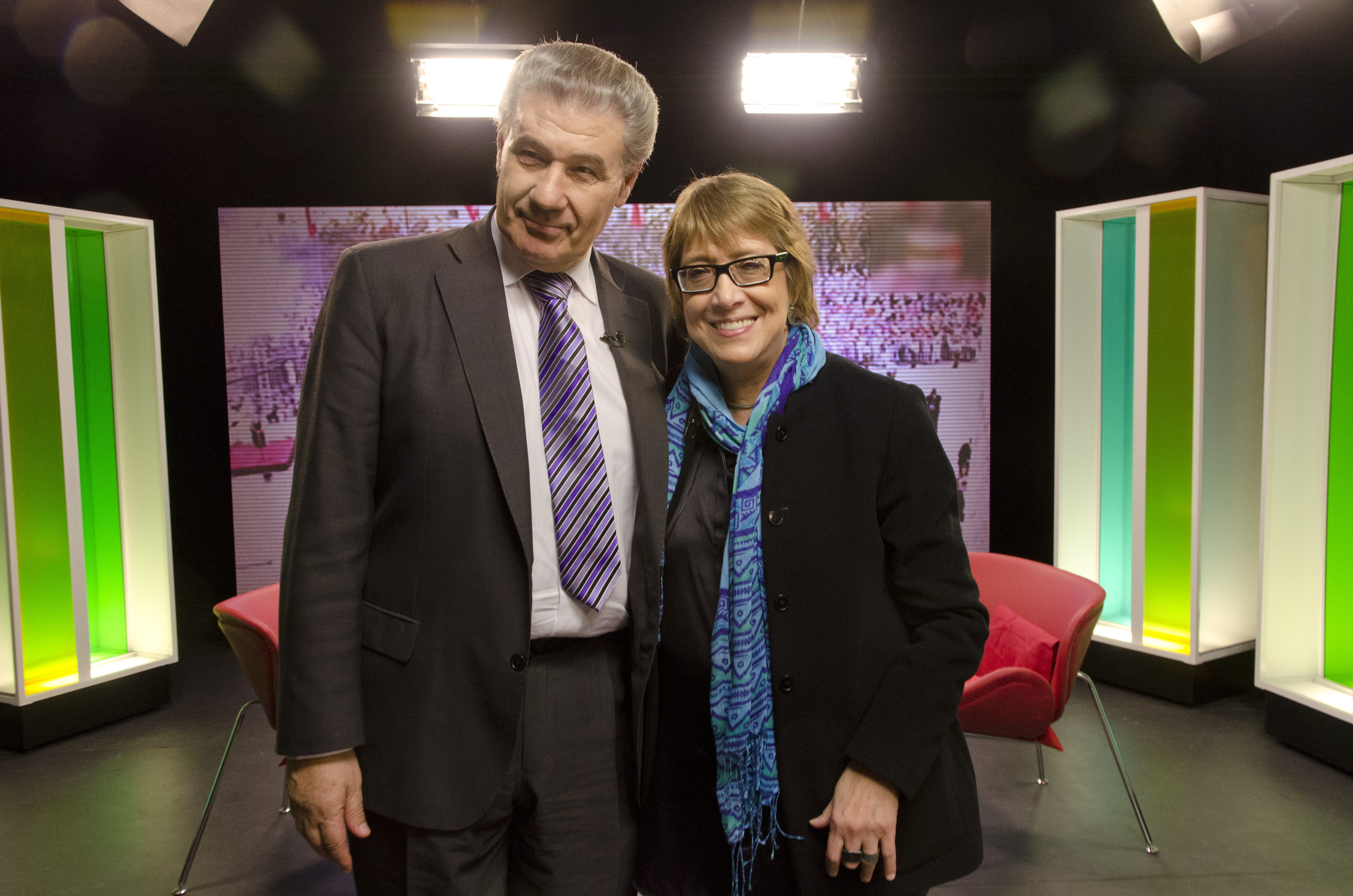 Buenos Aires, 10 de mayo de 2014 - La ministra de Cultura, Teresa Parodi participó del programa Voces de Cambio, conducido por Víctor Hugo Morales para Telesur, que se emite el domingo 11 sw mayo a las 21,30h por esa pantalla. Fotos: Romina Santarelli / Ministerio de Cultura de la Nación.